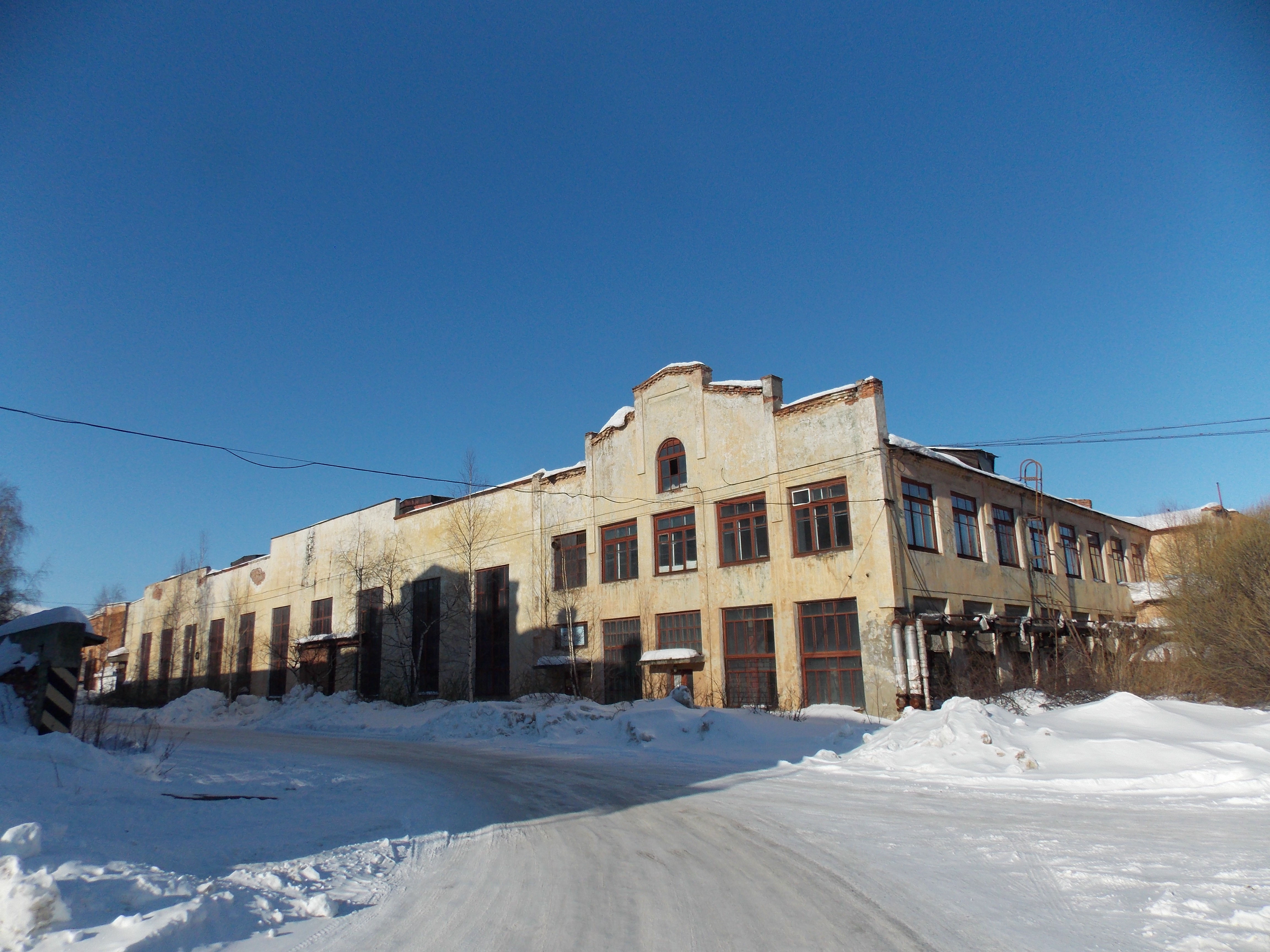 На первой площадке ОТЗ